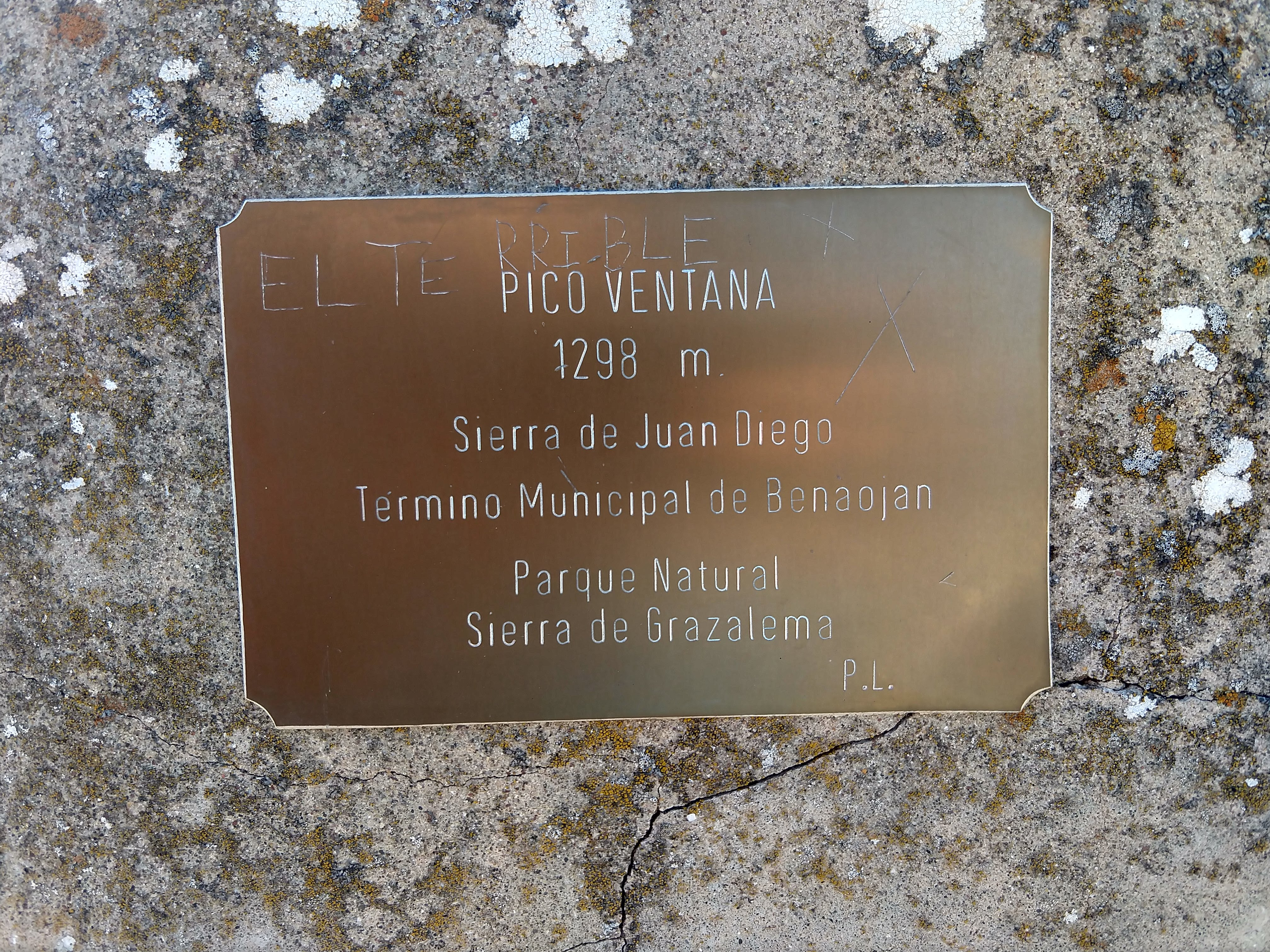 Placa identificativa que se encuentra en el vértice geodésico del Pico Ventana, en enero de 2020.